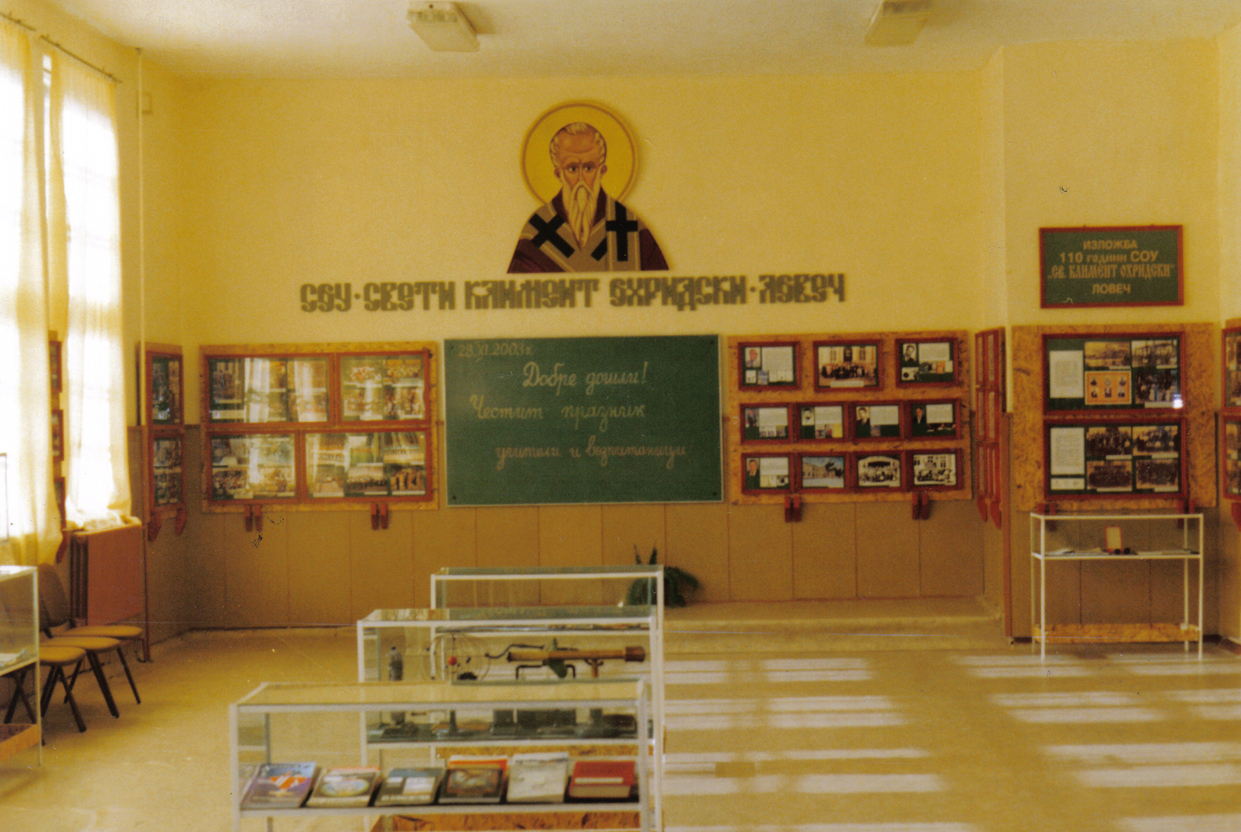 Експозицията